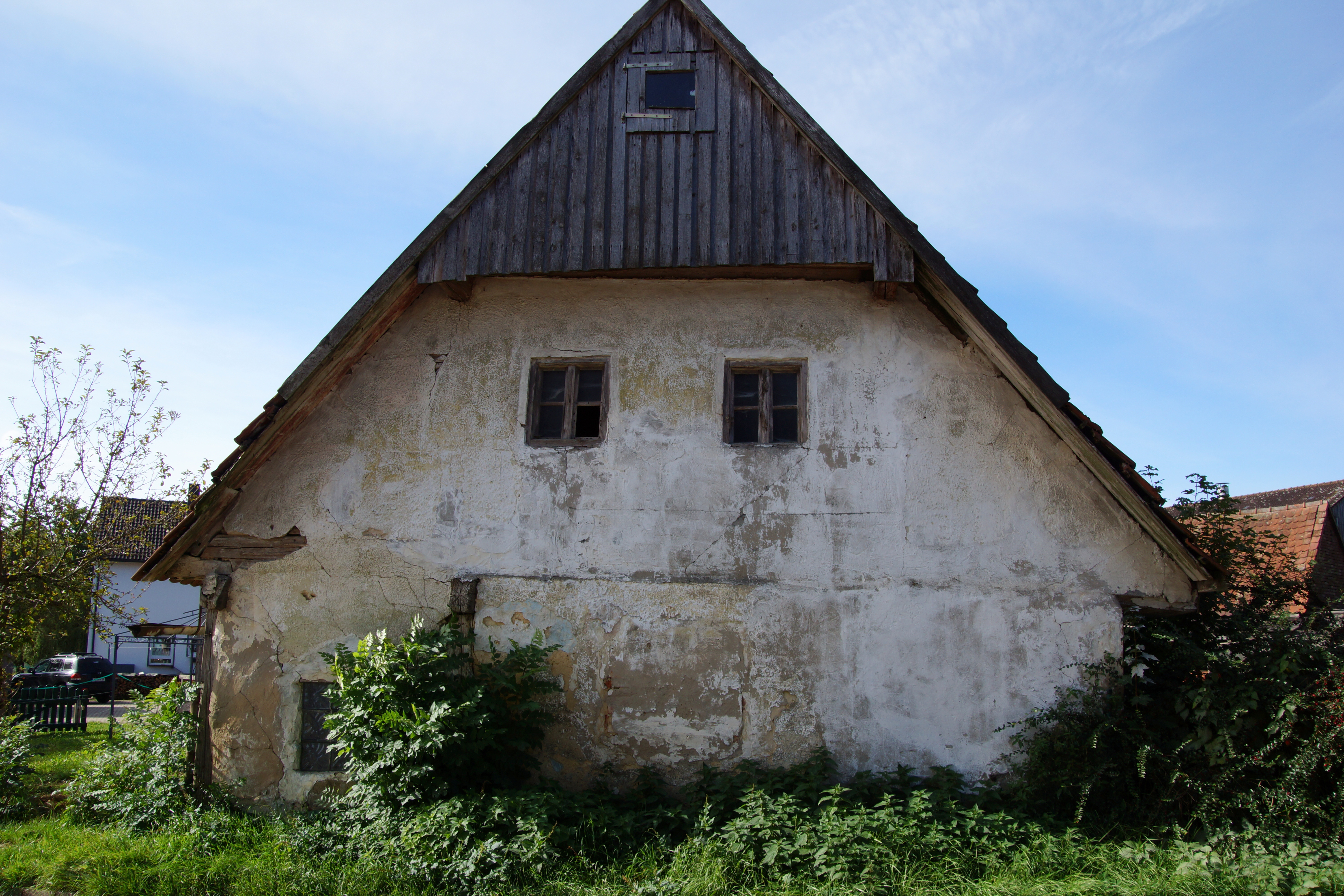 Giggling - Landkreis Neumarkt in der Oberpfalz